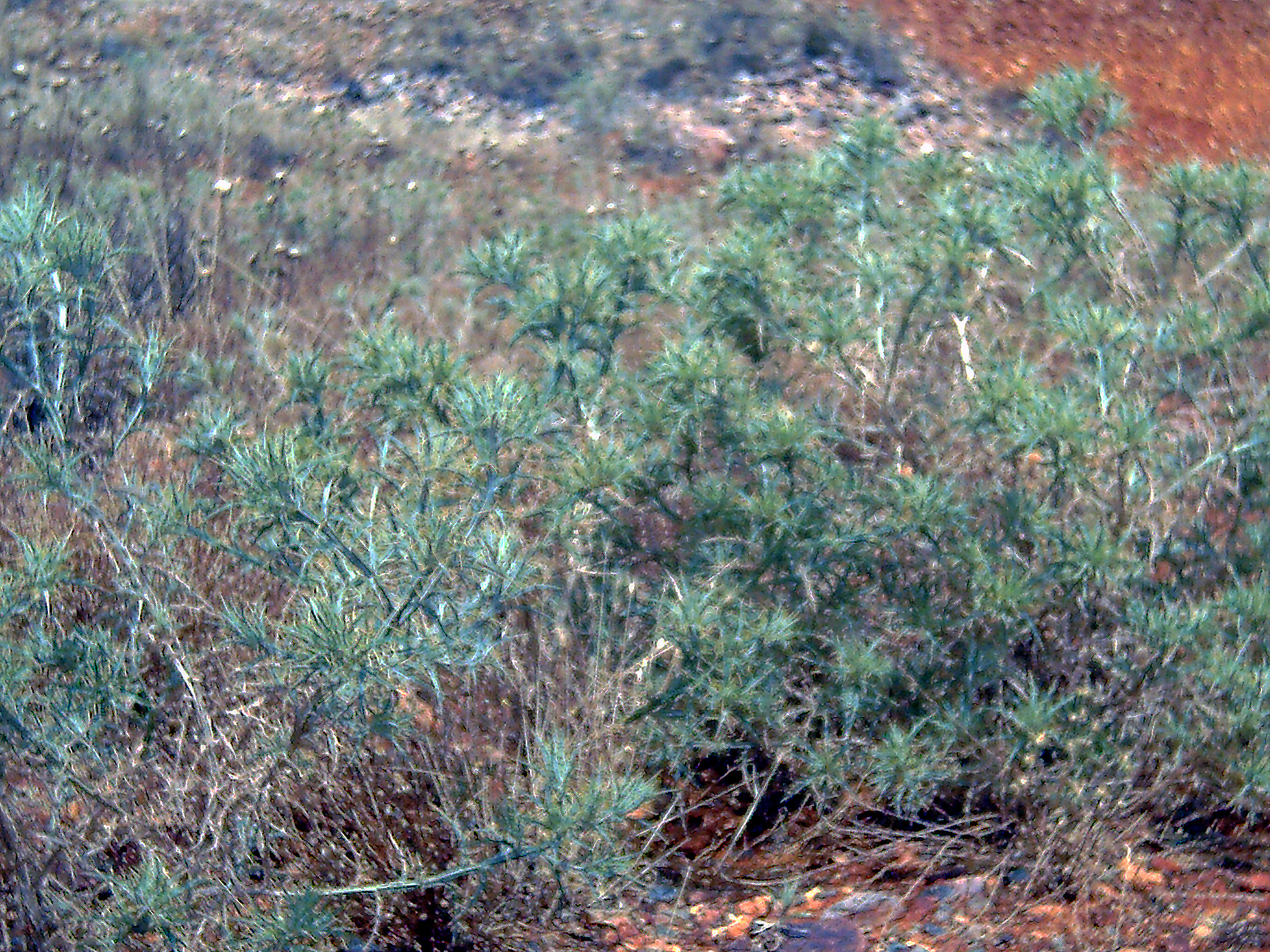 Picnomon acarna habitus Campo de Calatrava, Spain